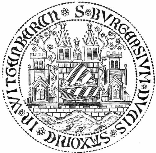 Nachzeichnung (1900) des ältesten Wappens von Wittenberg um 1300. Der lateinische Text lautet "S[igillum] BURGENSIUM DUCIS SAXONIE IN WITGENBERCN" ("Siegel der Bürger des Herzogs von Sachsen in Wittenberg")